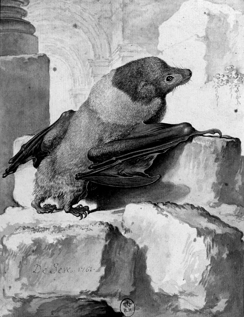 A painting of a 'rougette' or Lesser Mascarene Flying Fox from the book 'Histoire naturelle, générale et particulière, avec la description du Cabinet du roi (10th volume)' by the French naturalists Georges-Louis Leclerc, Comte de Buffon and Louis-Jean-Marie Daubenton (1763).